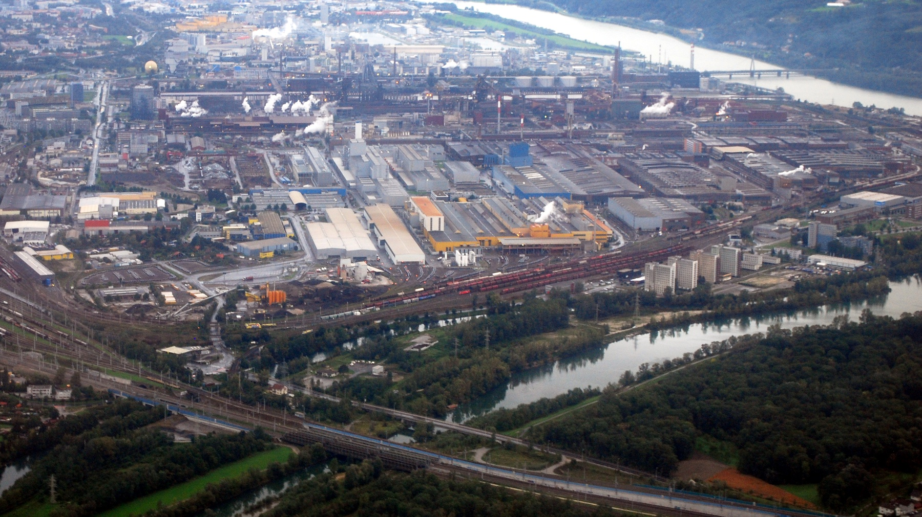 Werksgelände der voestalpine und weiterer dort angesiedelter Betriebe in Linz/St. Peter (heute Bezirk Industriegebiet-Hafen)